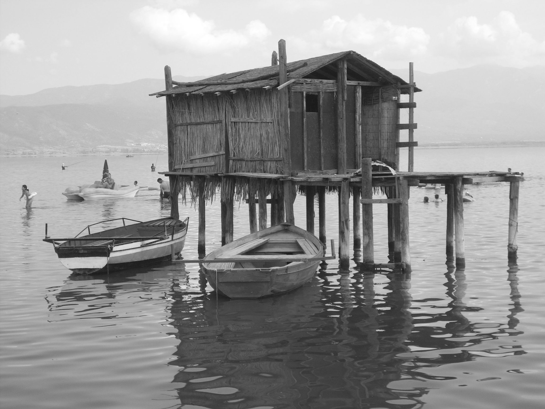 Дојранско Езеро